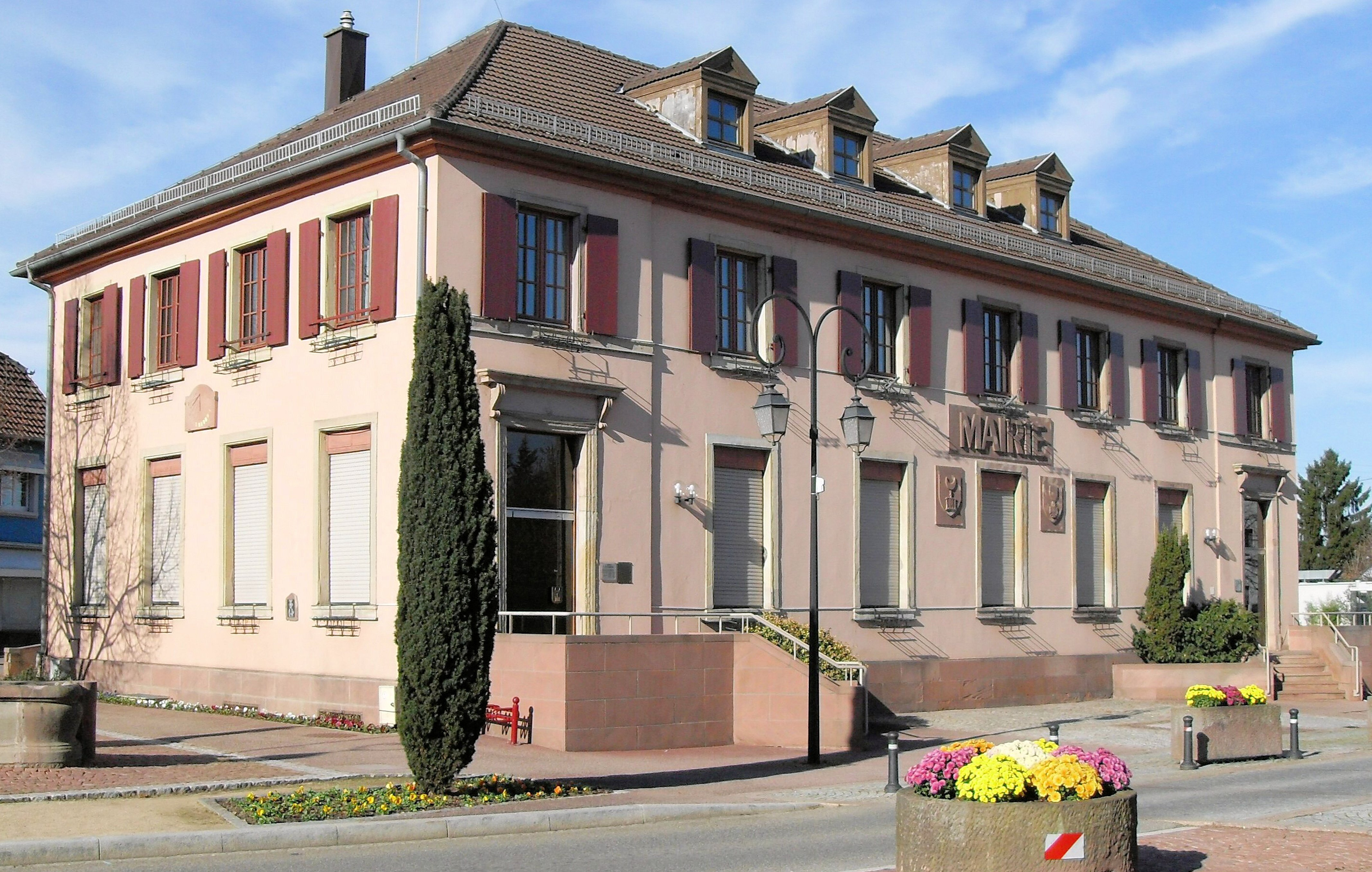 La mairie de Sausheim